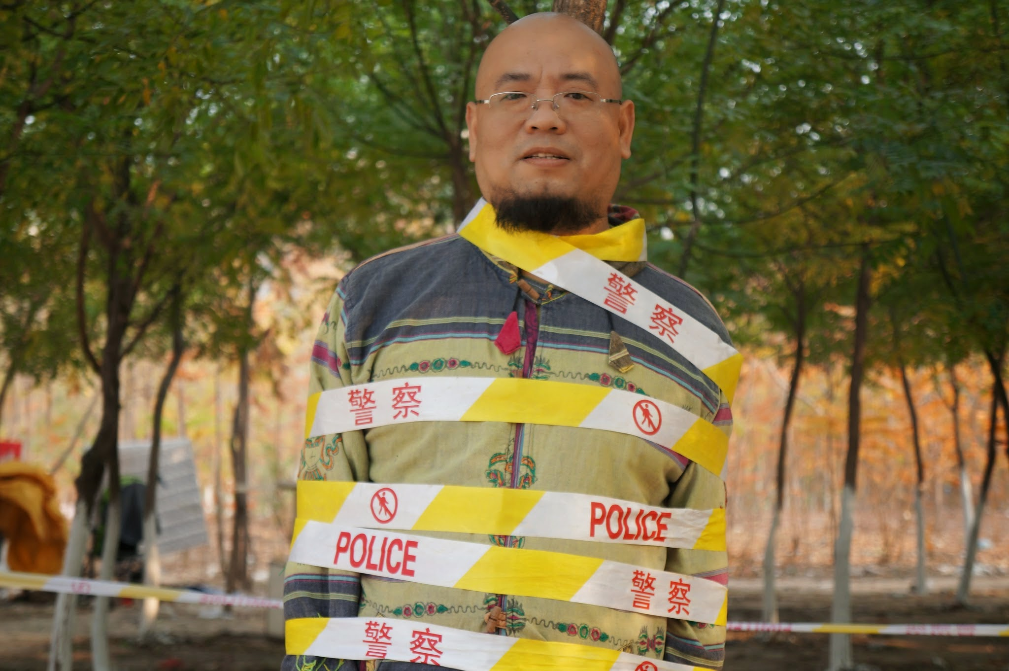 吴淦